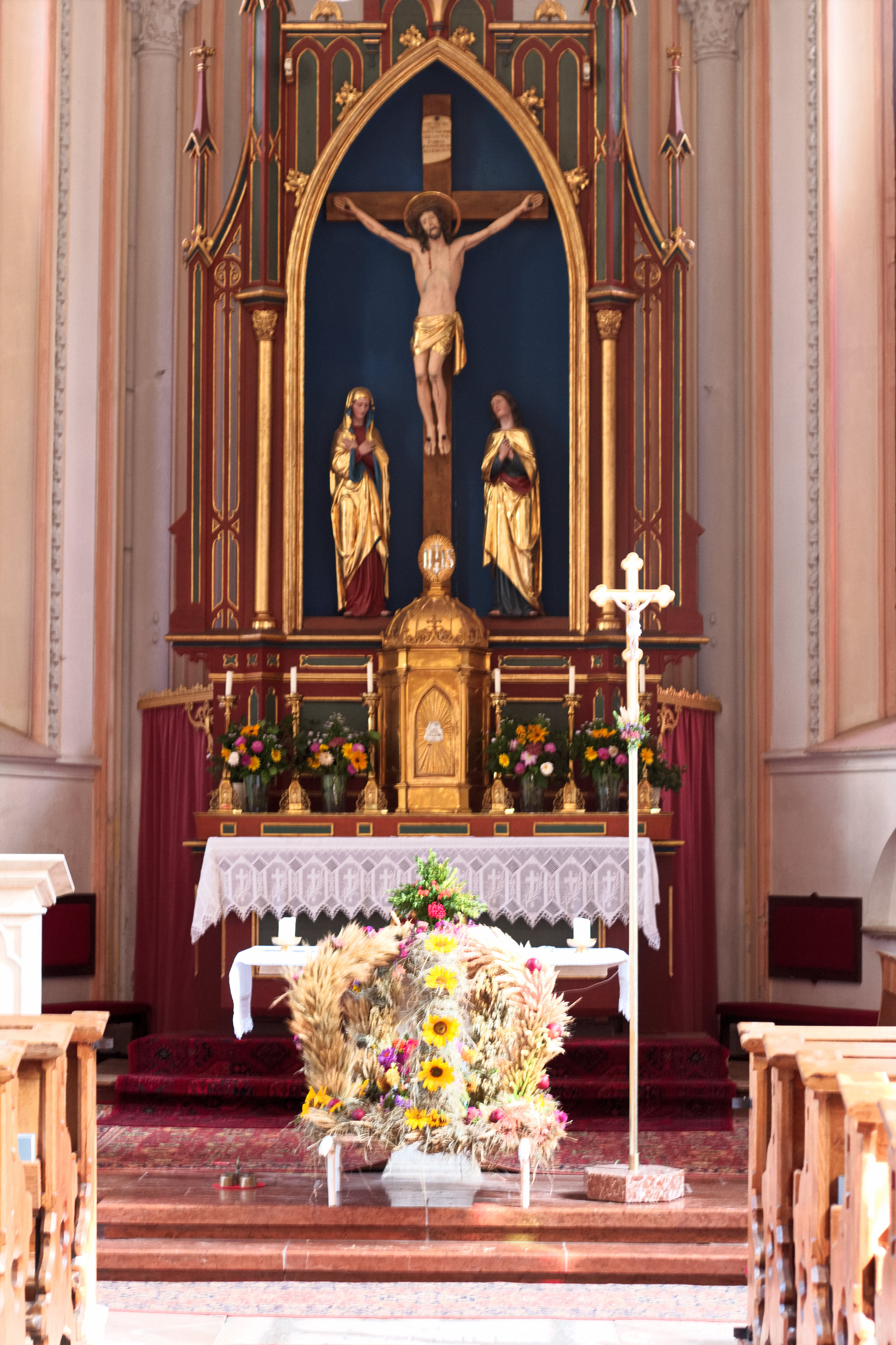 Hauptaltar der Filialkirche zum hl. Kreuz und zur hl. Elisabeth in Guggenthal, Gemeinde Koppl, Bezirk Salzburg-Umgebung